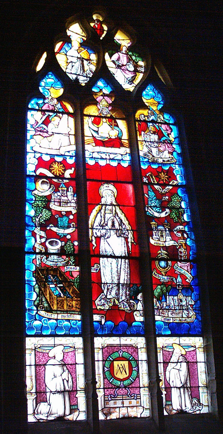 Saint-Etienne-la-Thillaye: Eglise - Verrière "l'Immaculée Conception" 16e siècle (classé au titre objet au Patrimoine de France)